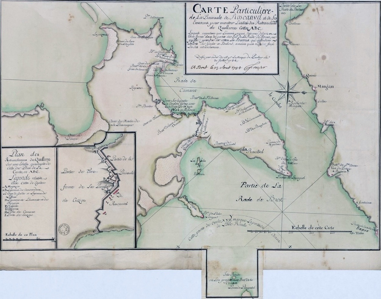 Carte particulière de la Péninsule de Roscanvel et de ses environs pour montrer l'utilité des retranchements de Quellerne, cottez ABC... Dressé par ordre de Mgr. le marquis de Paulmy, le 31 juillet 1754 (par Amédée François Frézier (1682-1773))